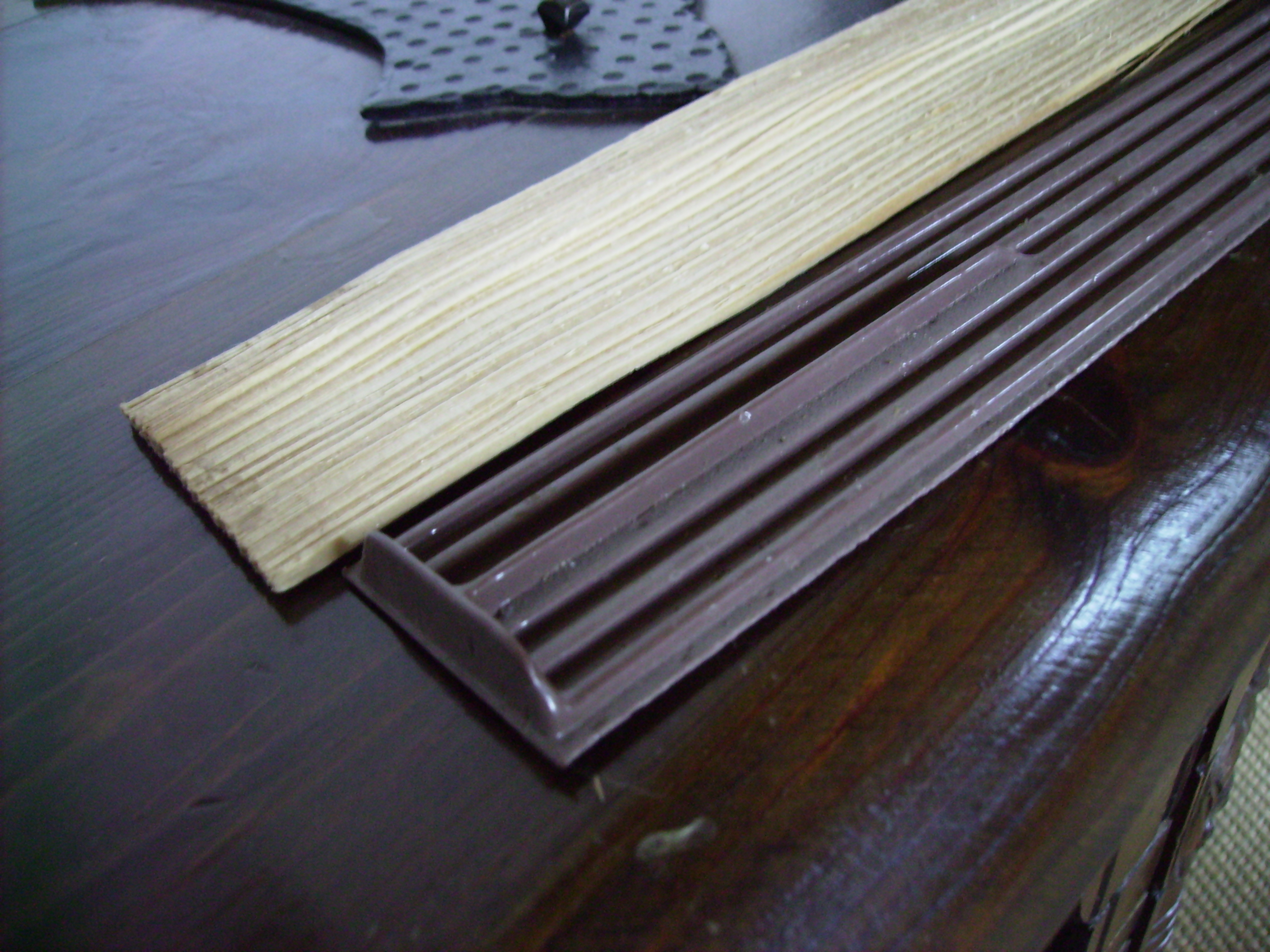 verschiedene Spließe für die Dachdeckung mit Biberschwanzziegeln